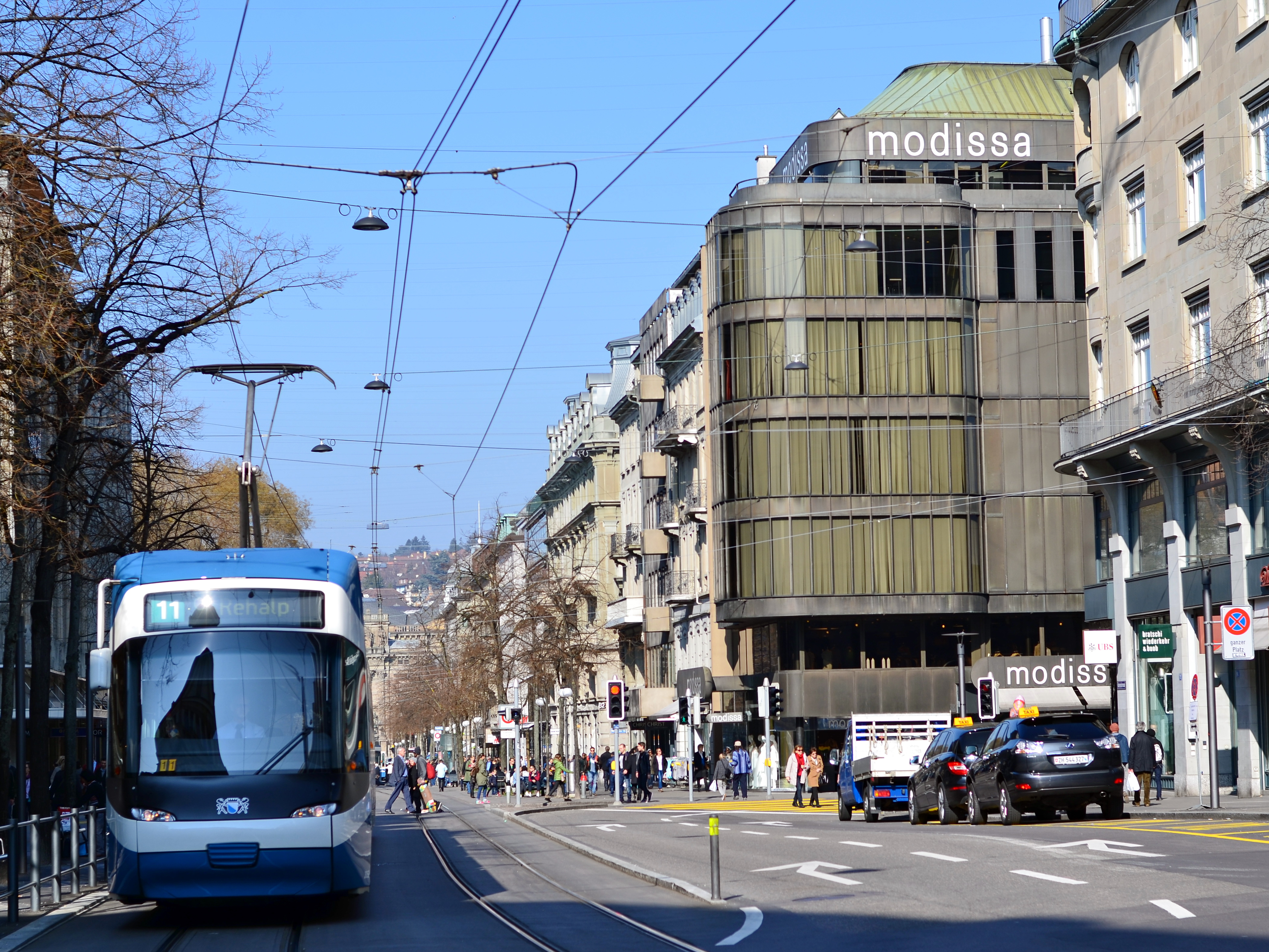 Bahnhofstrasse in Zürich (Switzerland)